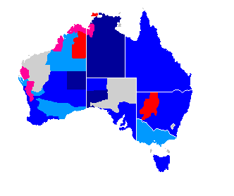 Map of Australia religion